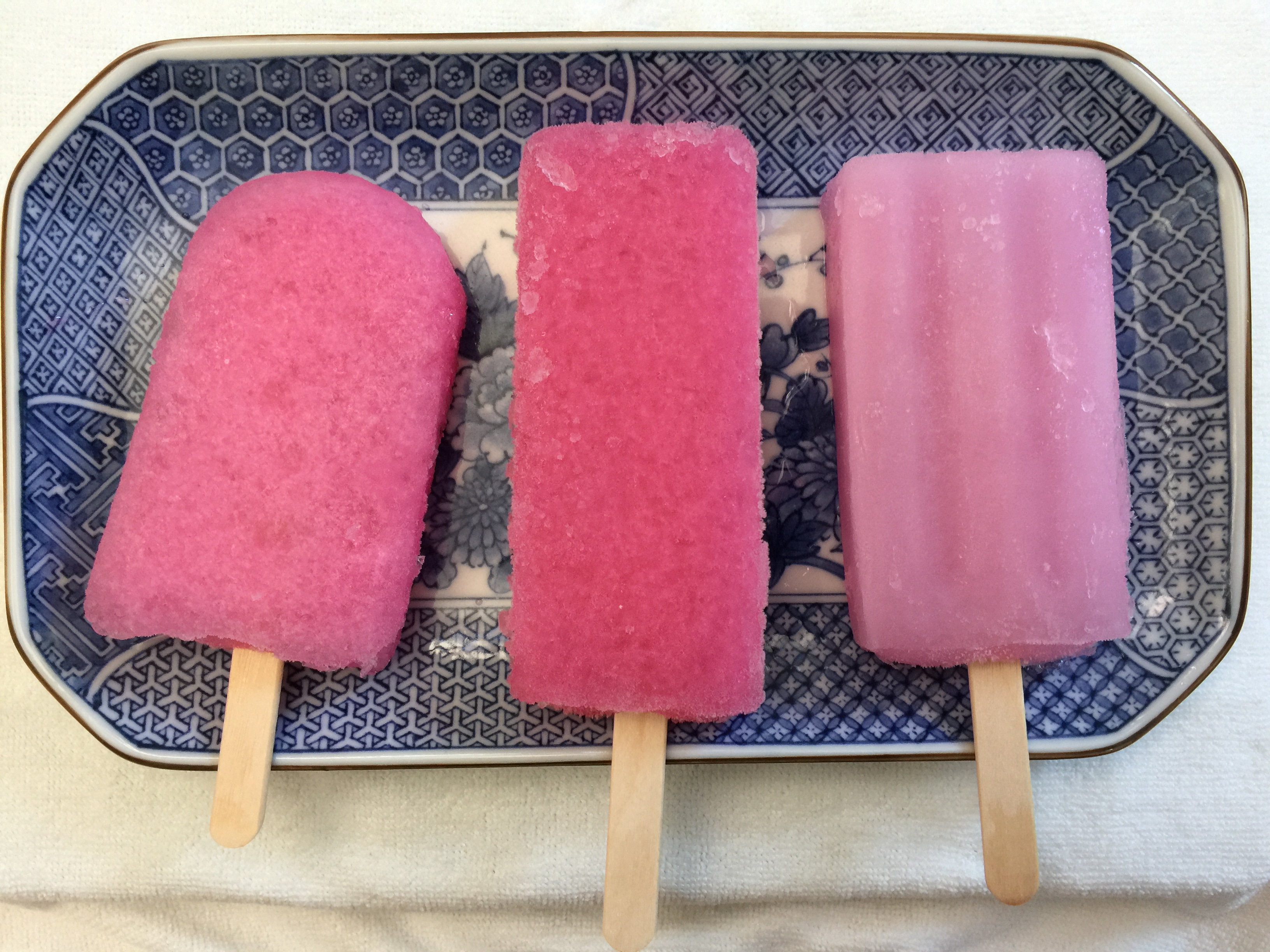 もも太郎アイス